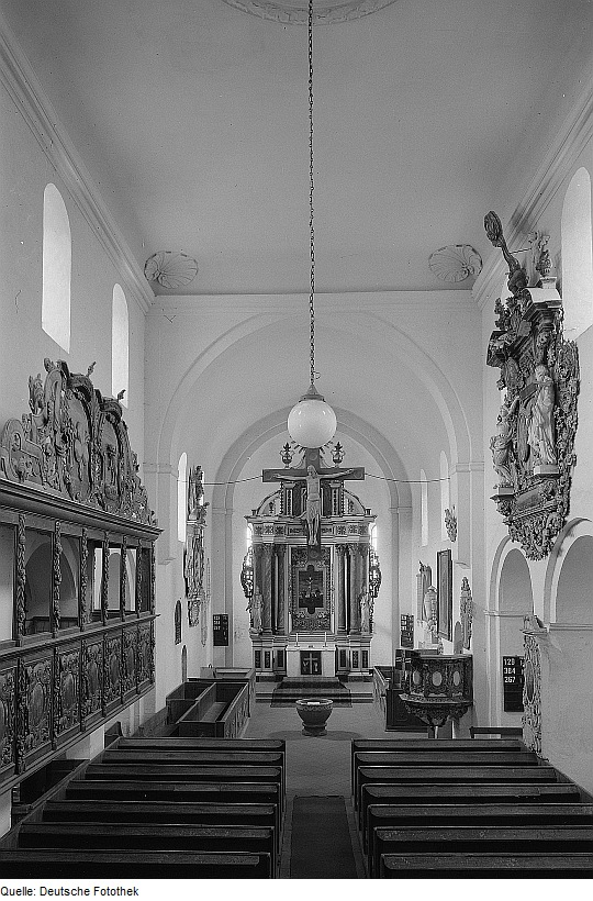 Original image description from the Deutsche Fotothek Schönhausen. Romanische Dorfkirche, Blick zum Altar